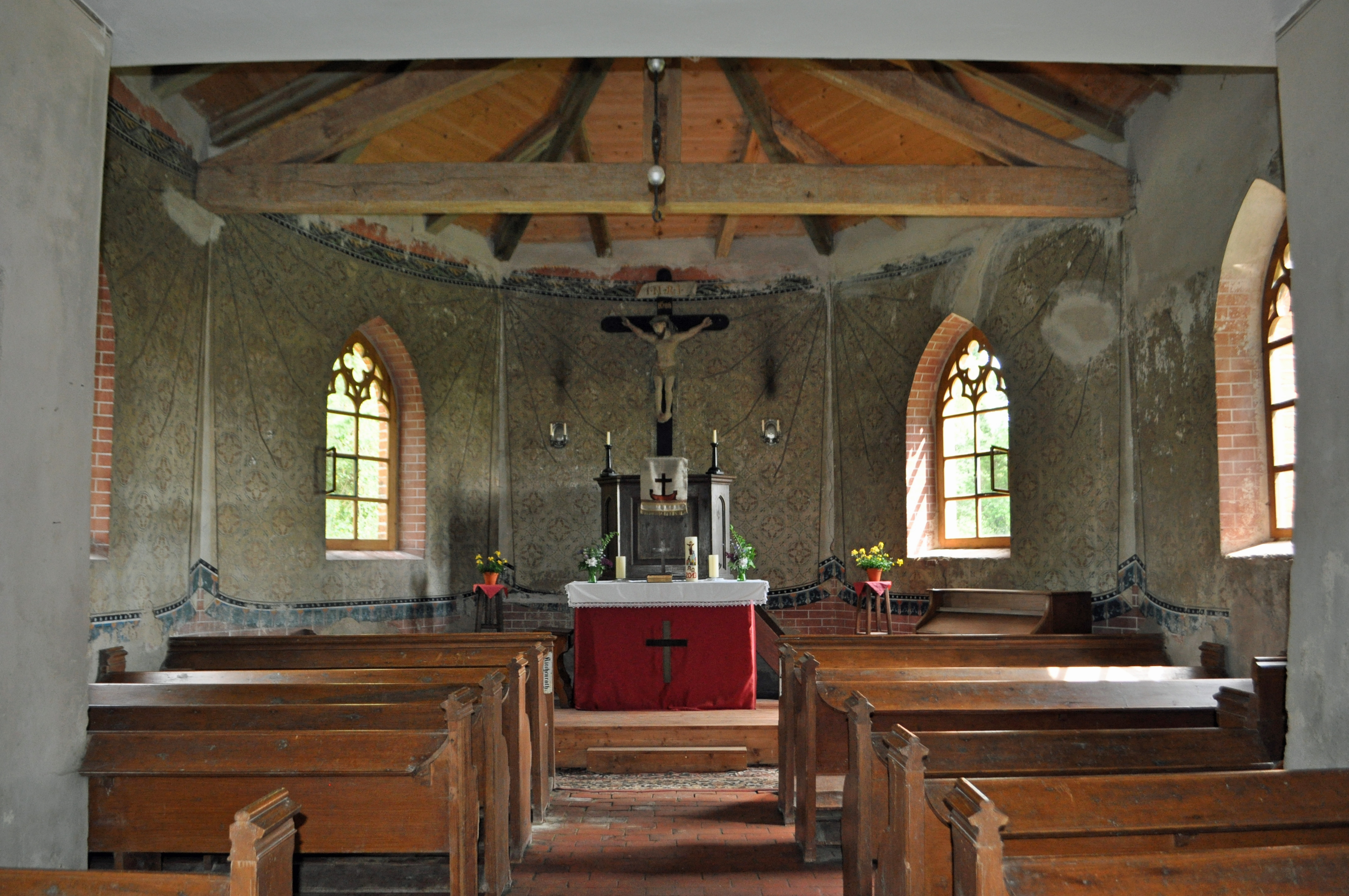 siehe Dateiname! Blick in den Chor